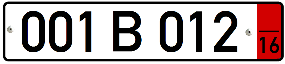 پلاک ماشین در جمهوری بلغارستان